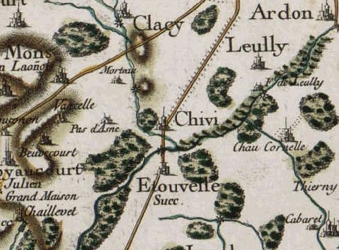 Carte de Cassini de Chivy et Etouvelles